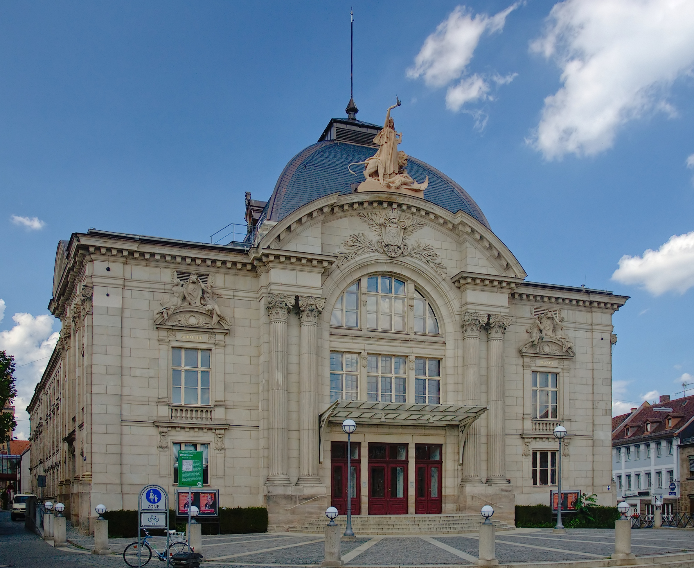 Das Stadttheater in Fürth/Deutschland